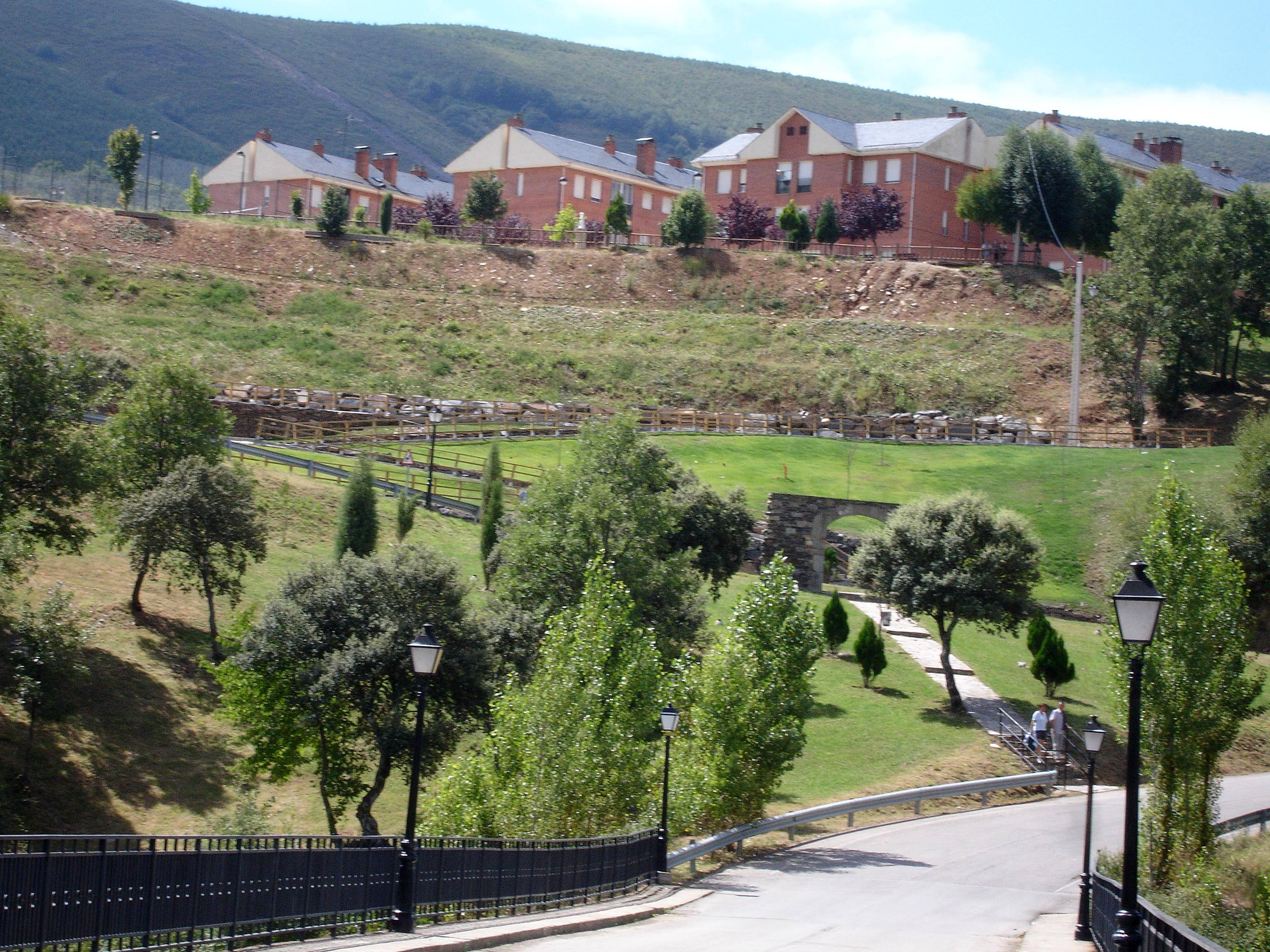 Páramo del Sil - León- España. Barrio de Las Campas